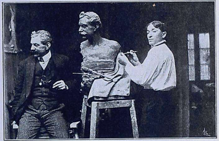 Francisco Asorey, á dereita, con 25 anos, esculpe o busto do fotógrafo Enrique Sánchez-Guerra, á esquerda. Fotografía realizada no seu primeiro taller, na rúa Caramoniña de Santiago de Compostela. O busto de Enrique Sánchez-Guerra non está exposto, pertence, actualmente, a unha colección privada.